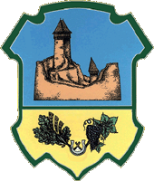 Герб Ужгородського району